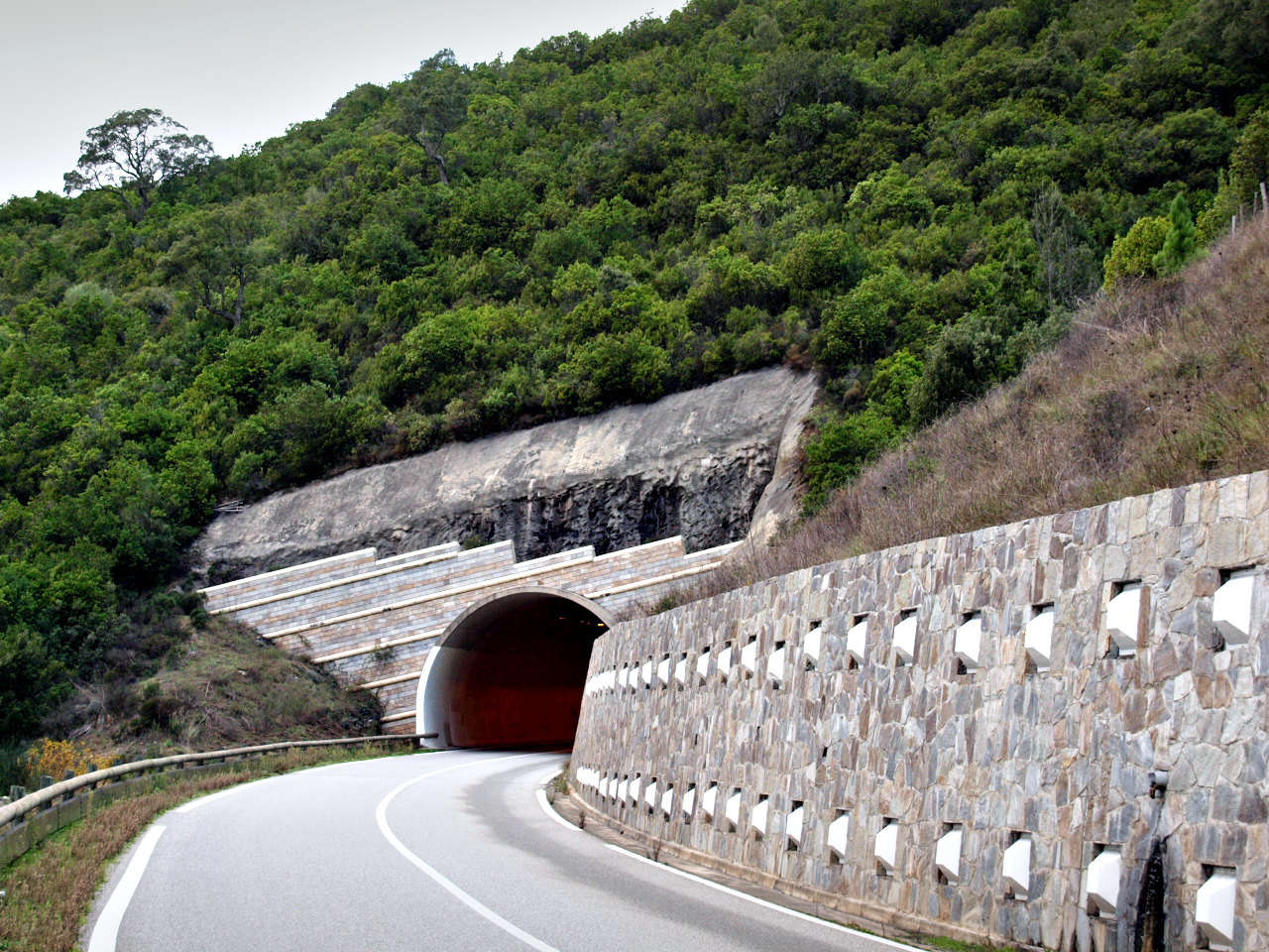 Giuncaggio, Rogna (Haute-Corse) - Tunnel de l'Isolella (route territoriale 50), sur la rive gauche du Tavignano